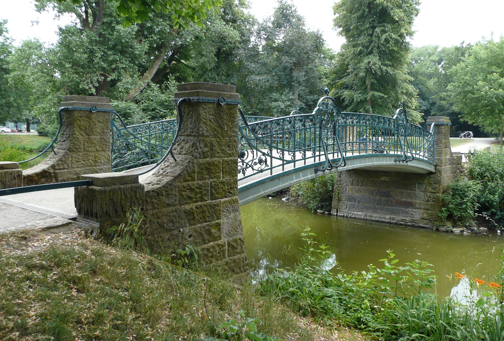 Maschteichbrücke